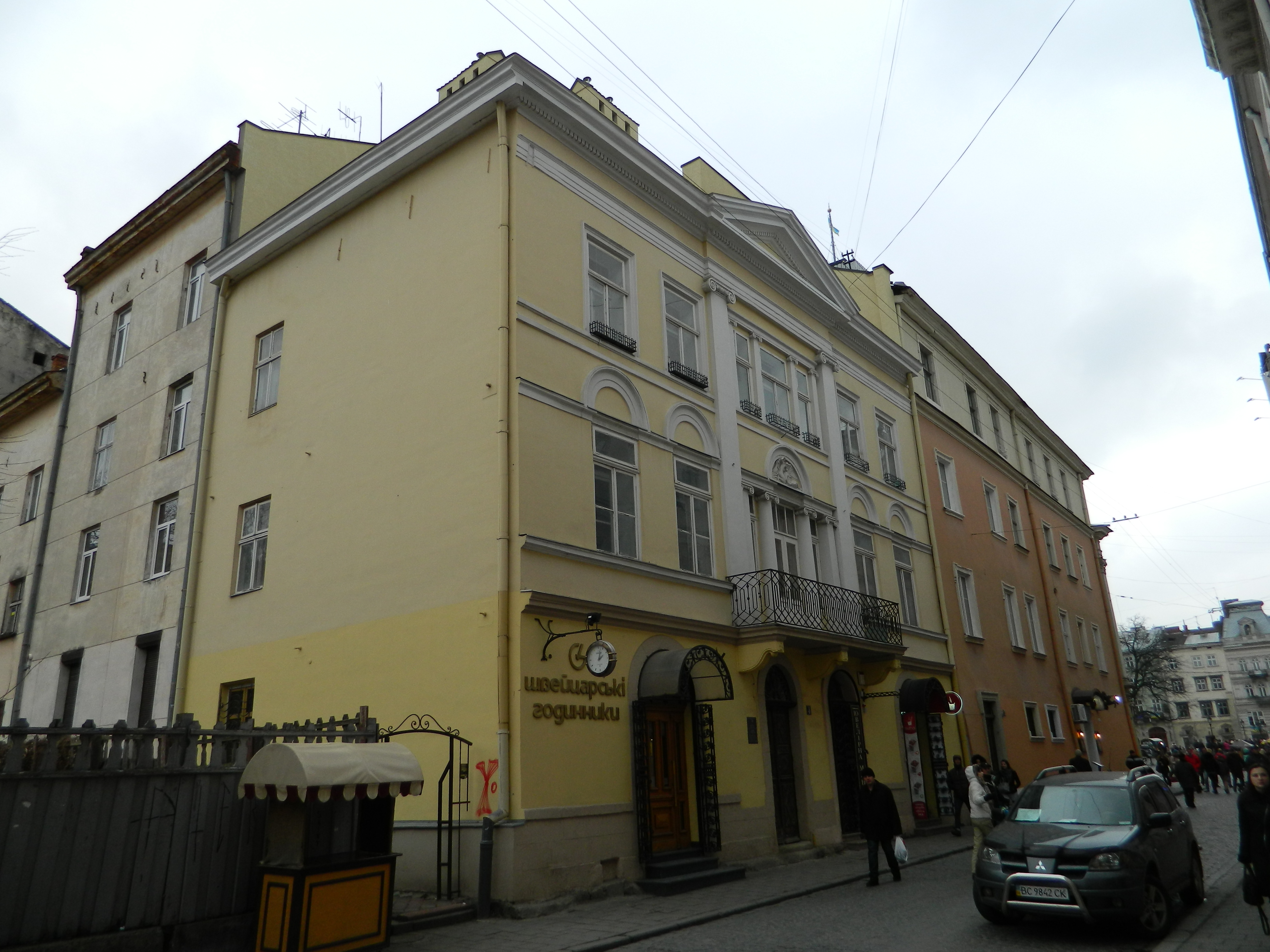 На месте нынешнего дома №4 стоял дом, в котором жил и работал Иван Фёдоров